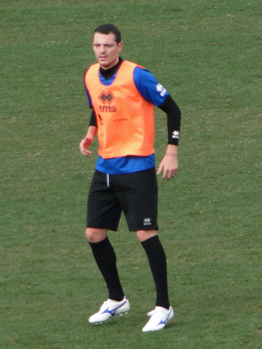 Luigi Giorgi, calciatore italiano